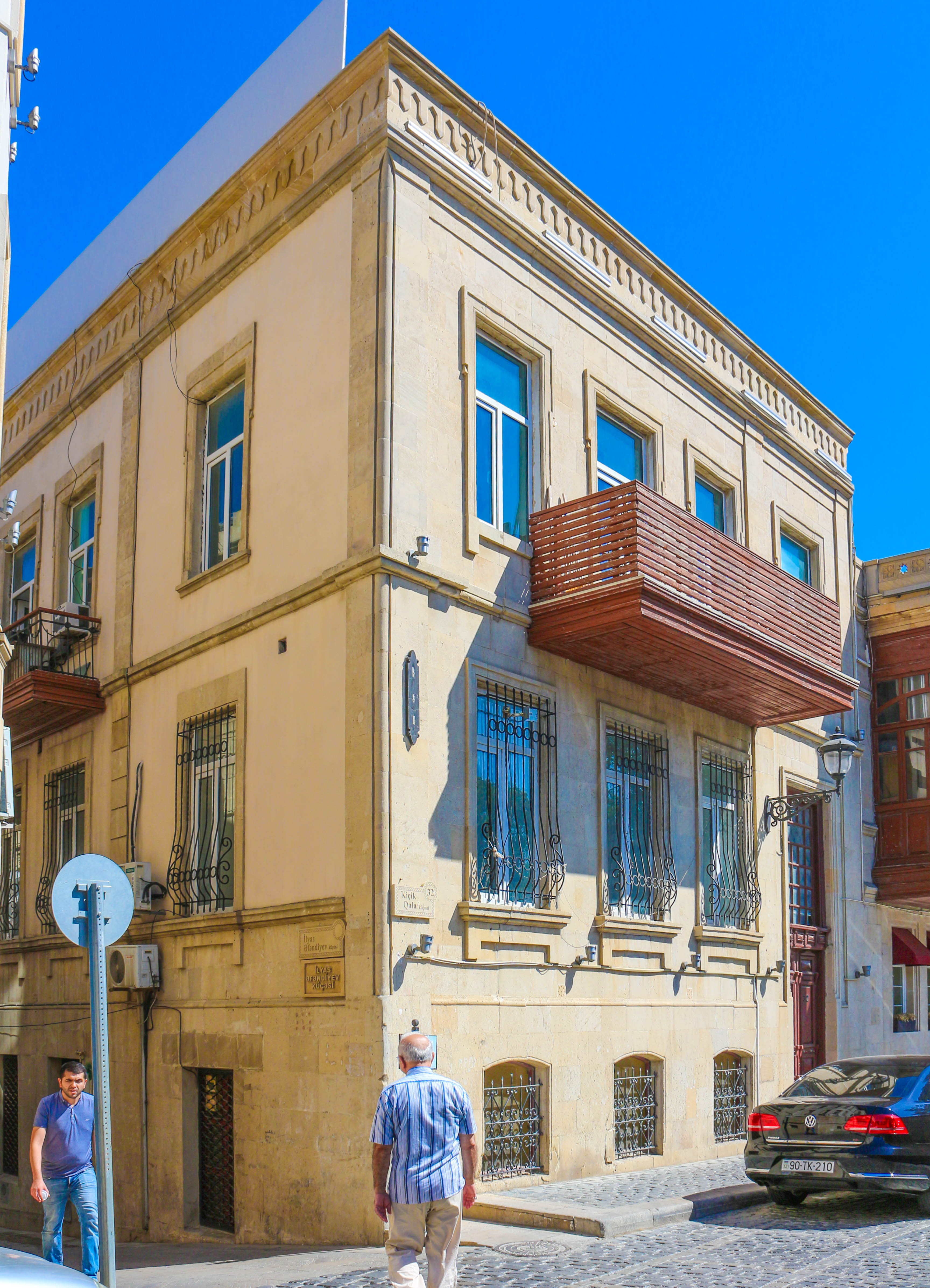 Yaşayış evi, Kiçik Qala küçəsi, 32